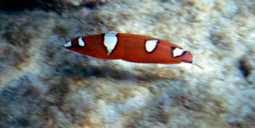 Coris gaimard (juvenile)